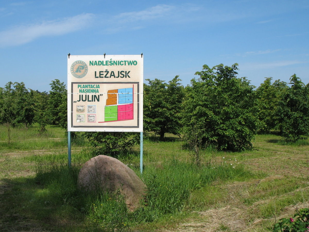 Julin (Polska) - plantacja nasienna